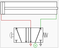 Zirkuitu pneumatikoa